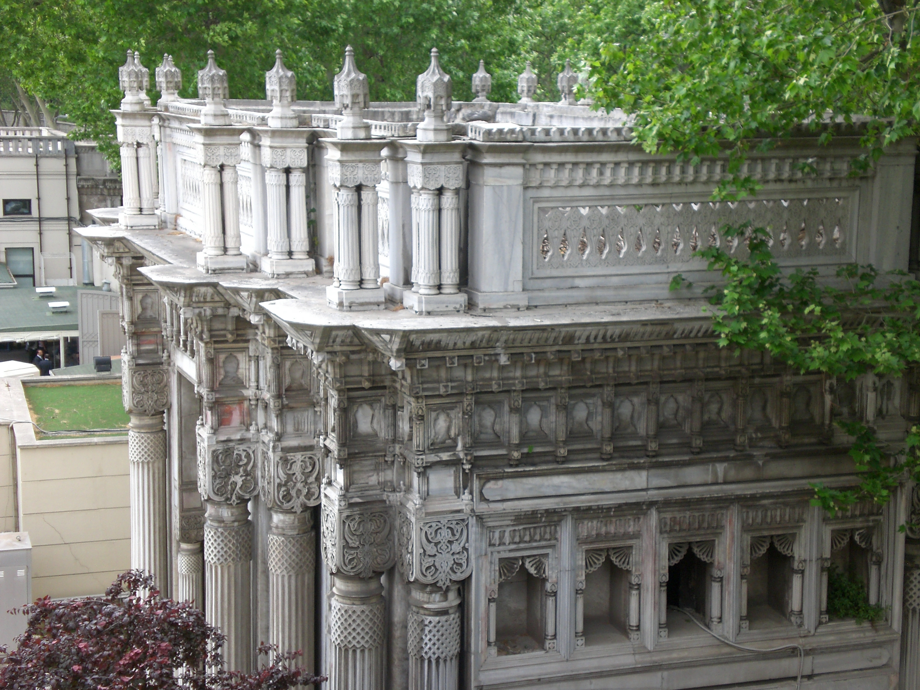 Istanbul Ciragan Palace Hotel